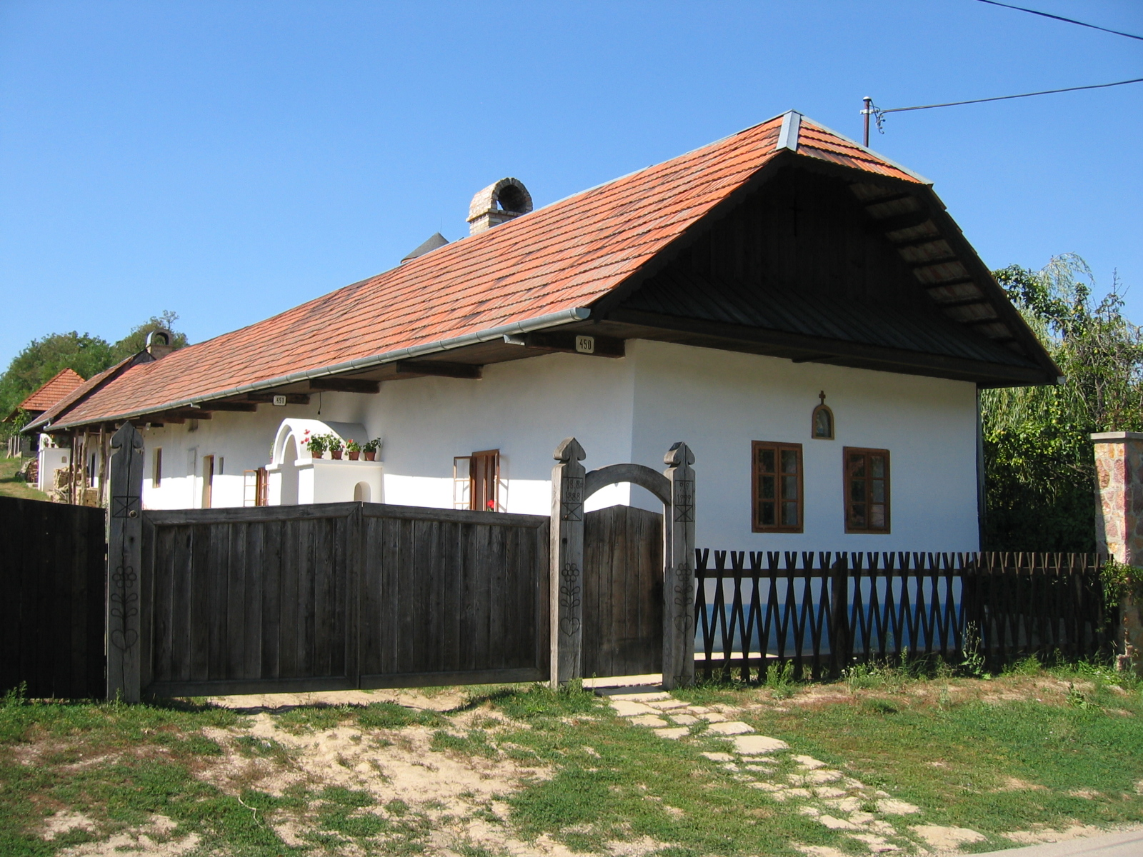 Sedliacky dom, Velke Lovce